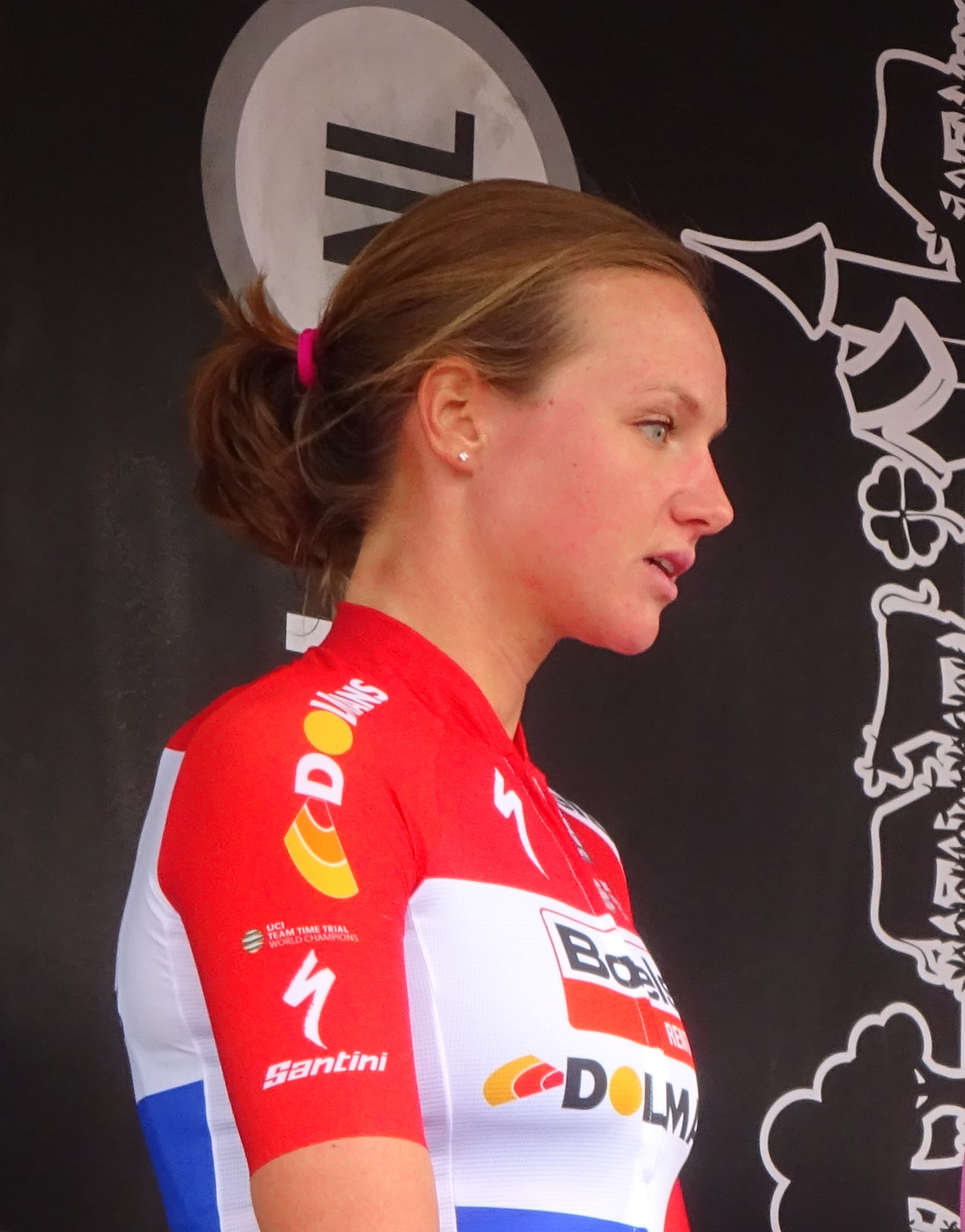 Chantal Blaak wint het damescriterium